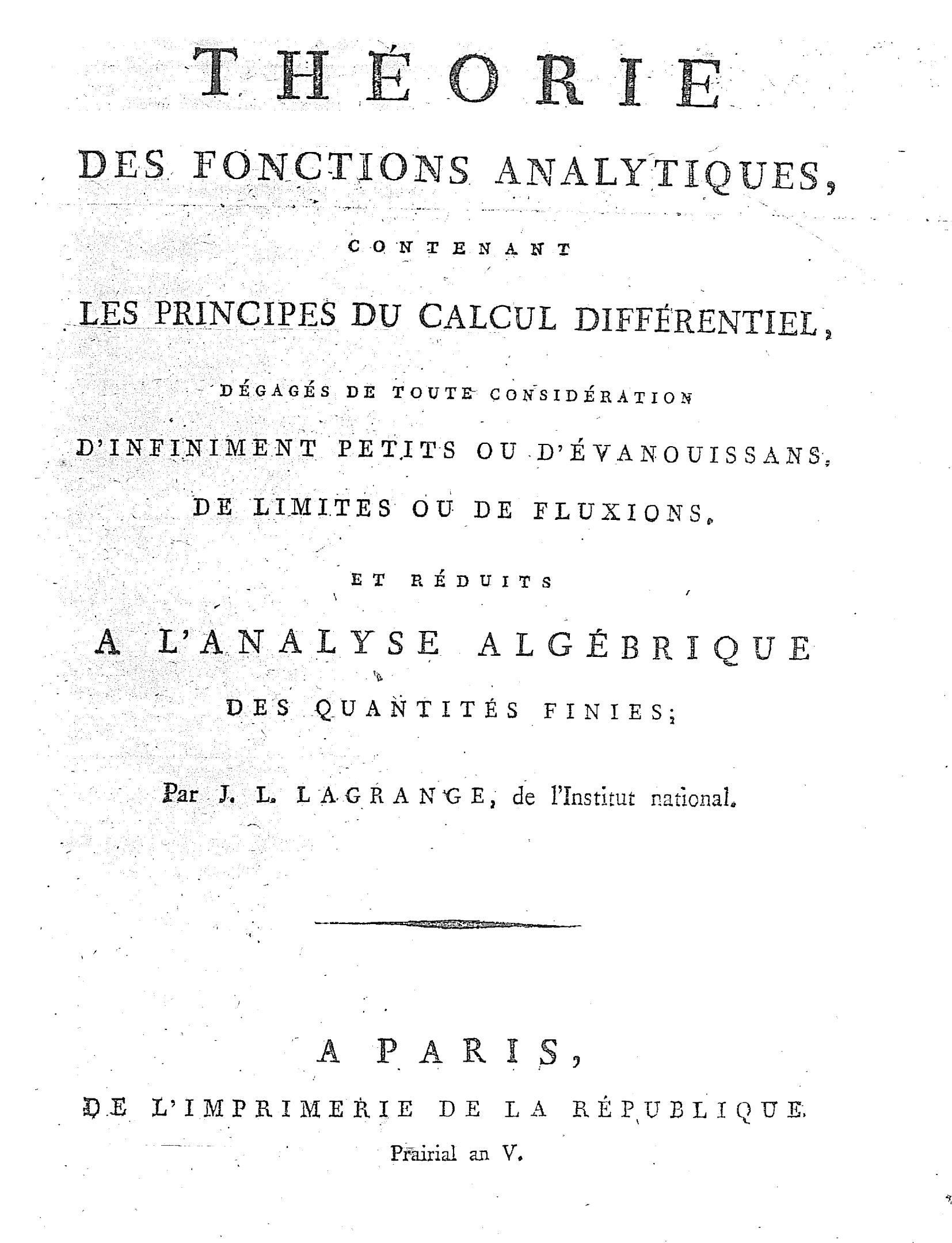 Théorie des fonctions analytiques, contenant les principes du calcul différentiel, dégagés de toute considération d'infiniment petits ou d'évanouissans, de limites ou de fluxions, et réduits a l'analyse algébrique des quantités finies. par J.L. Lagrange de l'Institut national. - A Paris : de l'imprimerie de la Republique, an V [1797]. - [4], viij, 276 p. ; 4º .